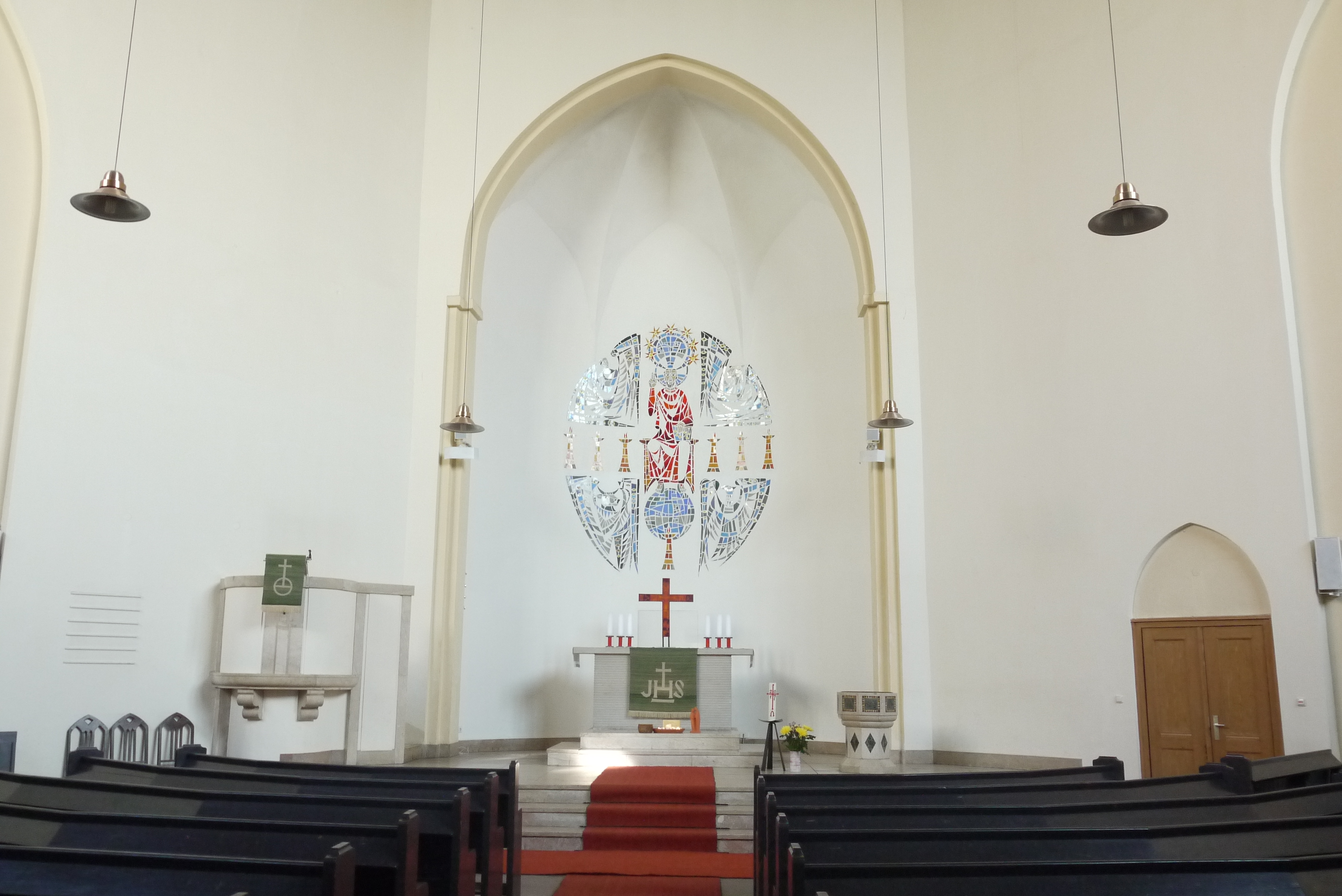 Der Altarraum der evangelischen Adventkirche in Berlin-Prenzlauer Berg.